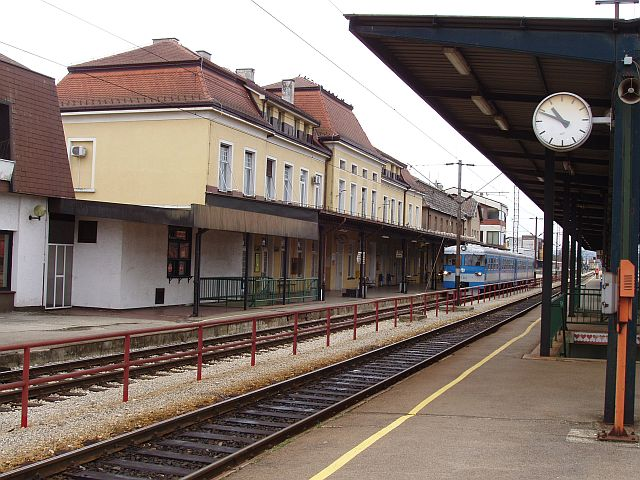 Kolodvor Koprivnica, 13. april 2006.